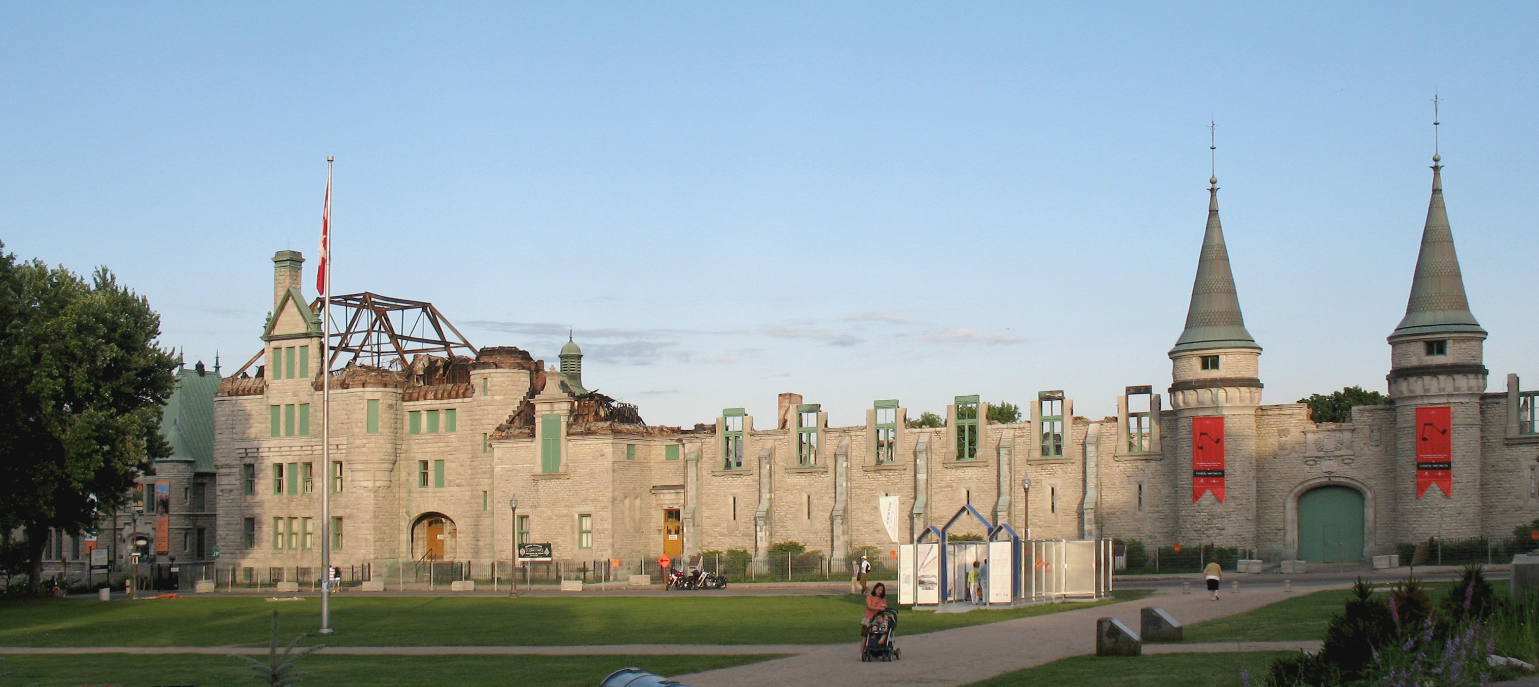 Manège militaire de Québec, Ville de Québec, province de Québec, Canada en juillet 2008